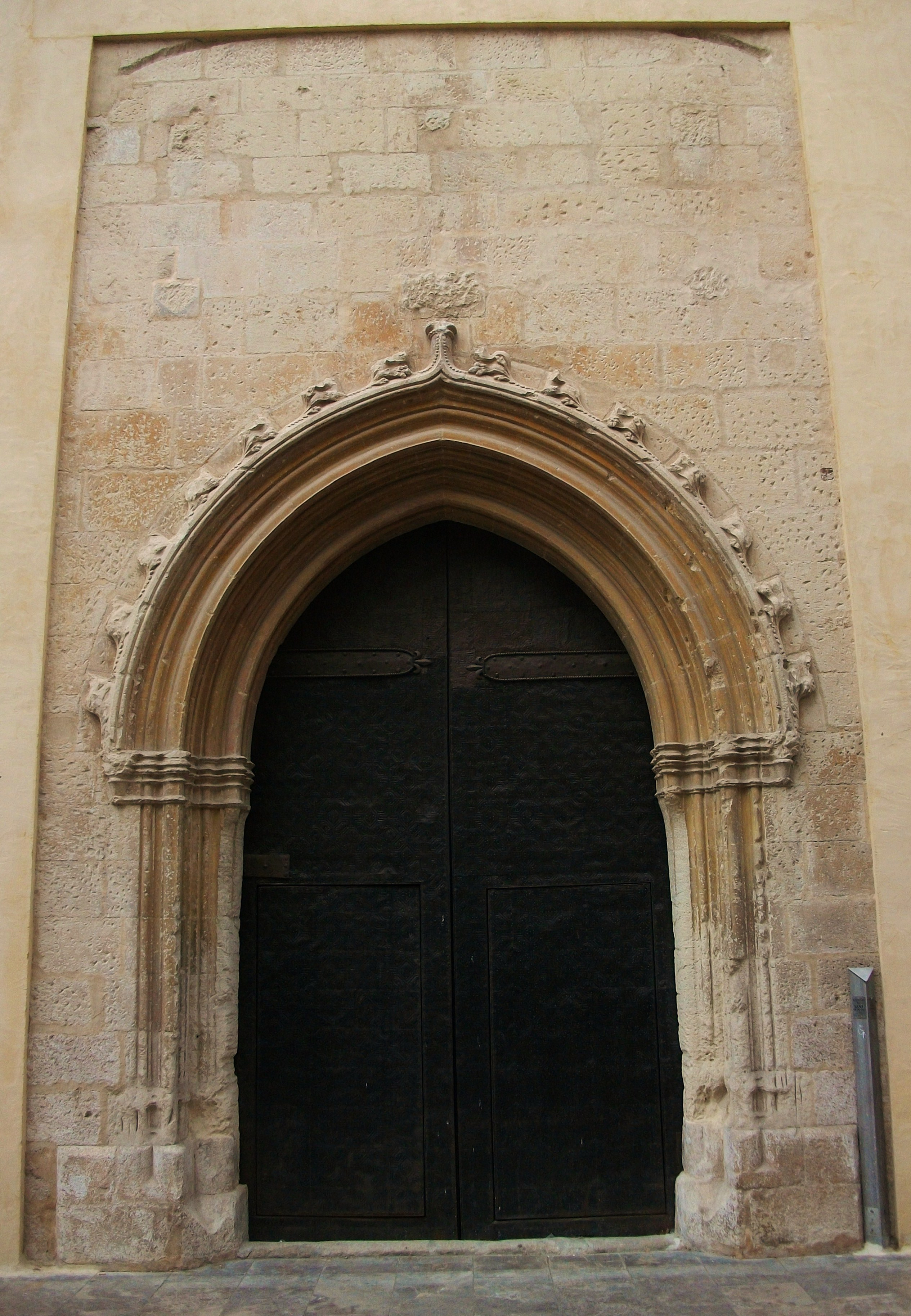 Portada lateral de l'església de Sant Francesc de Xàtiva, segle XIV.